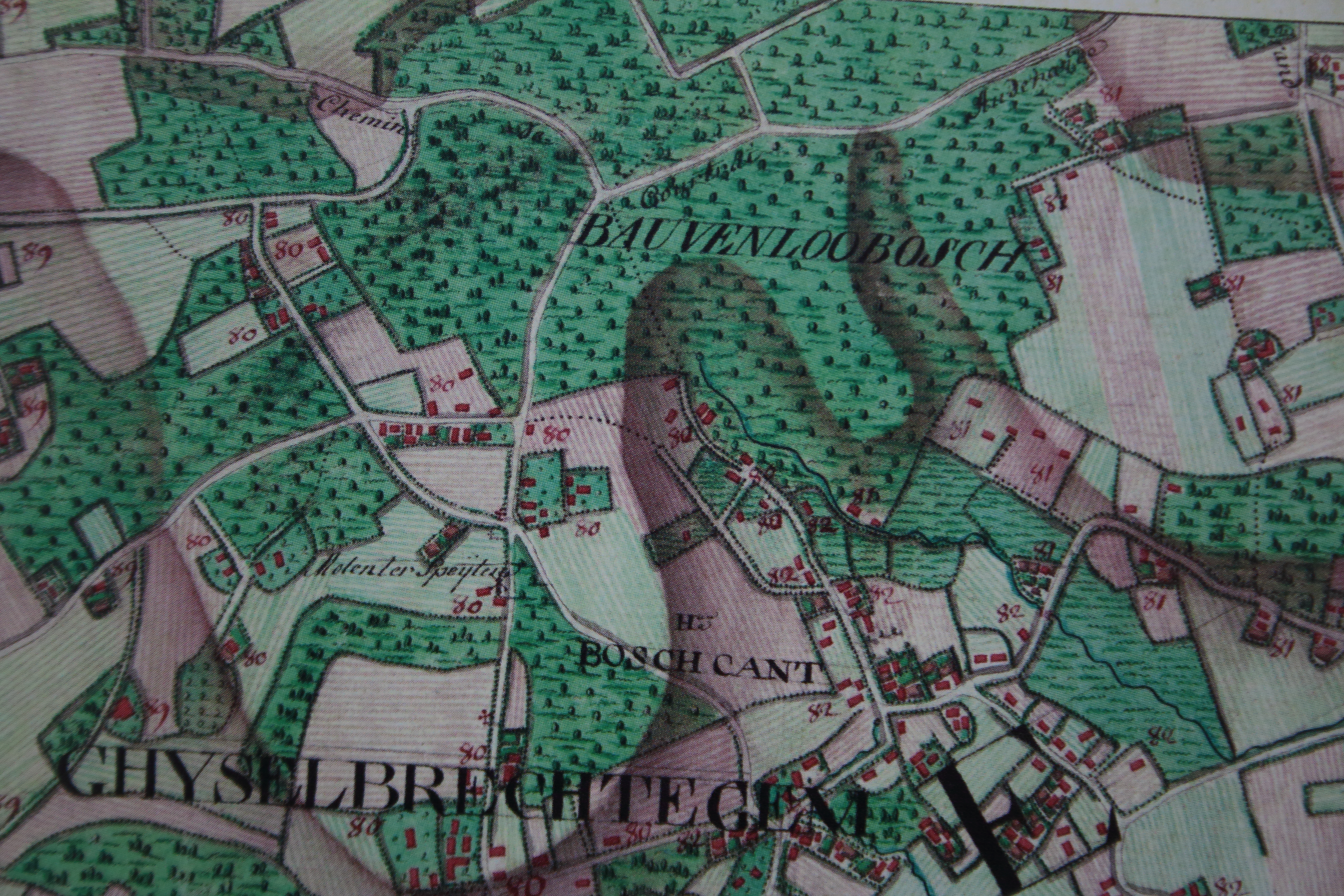 Bouvelobos, Ferrariskaart (1771)